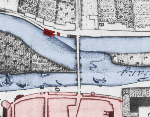 Blümer Mühle auf einer Karte von 1728 von Münden, Karte nachträglich genordet